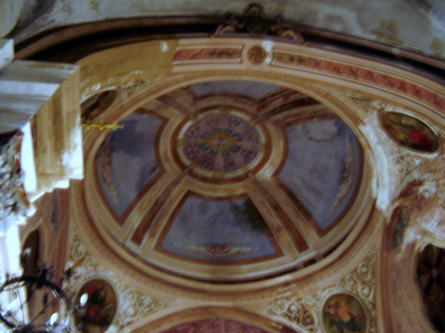 Cupola della Chiesa madre di Carpino